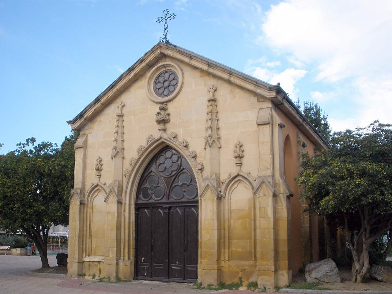 Ermita de Santa Ana, en Las Arenas (Getxo)